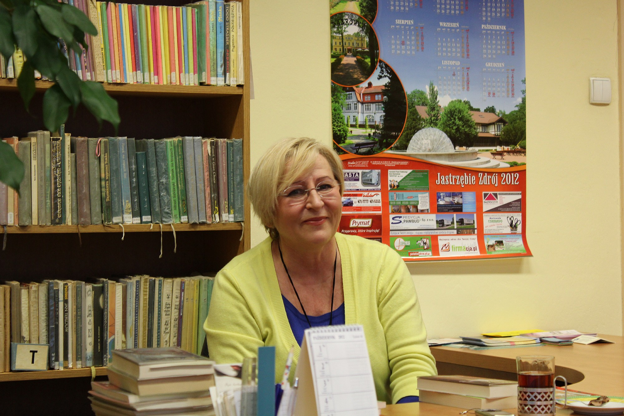 Marta Fox podczas spotkania z czytelnikami w Gminnej Bibliotece Publicznej w Zebrzydowicach 30.03.2012